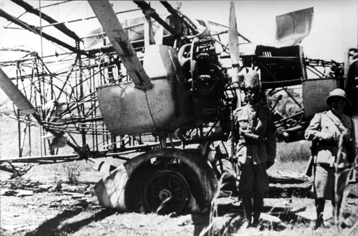 Resti dell'aereo Caproni Ca.133 della missione del generale Vincenzo Magliocco, morto nell'eccidio di Lechemti